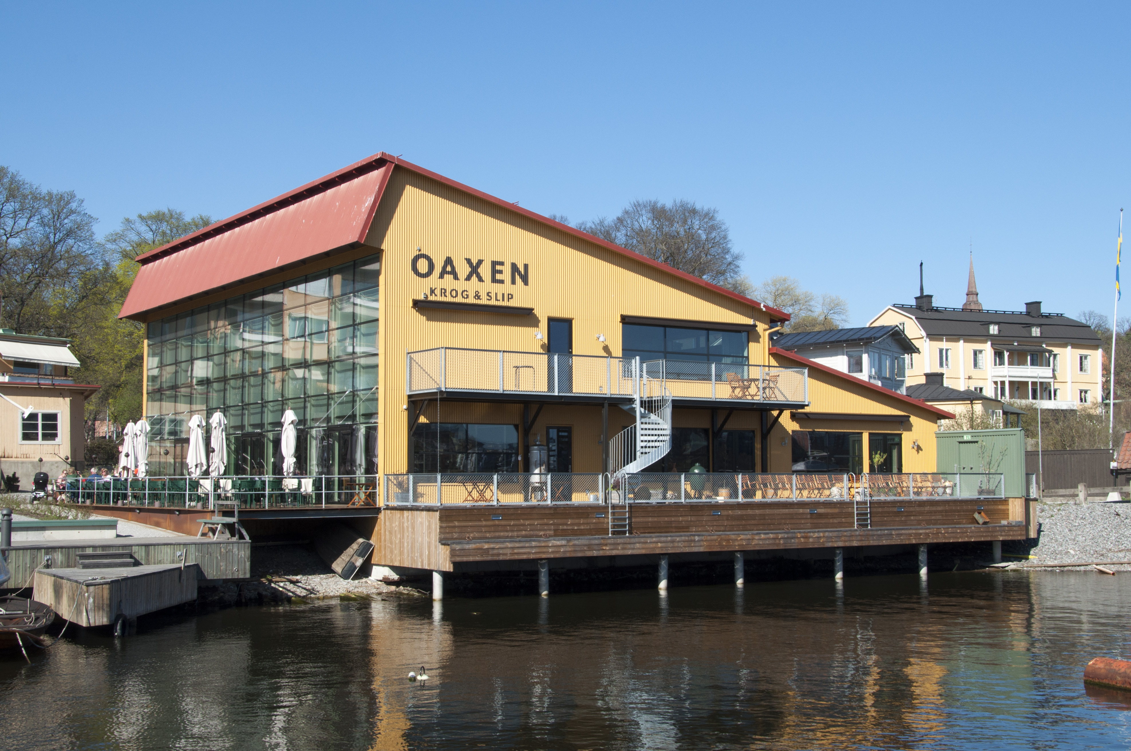 Oaxen Krog & Slip, Beckholmsvägen 26, Byggnadsår 2013, Arkitekter: Mats Fahlander och Agneta Pettersson. Byggherre: Kungliga Djurgårdsförvaltningen och Oaxen Krog